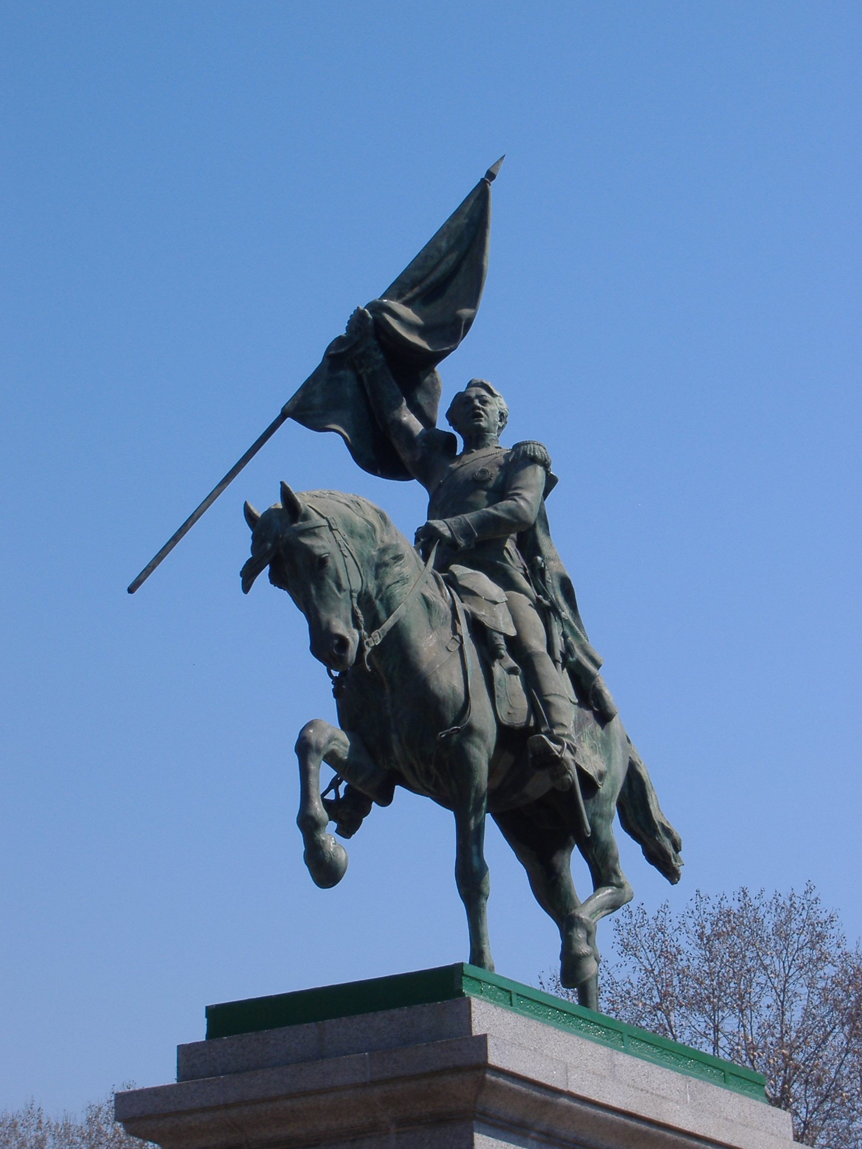 Argentine independence war hero General José de San Martín, statue in Plaza San Martín, downtown Rosario.